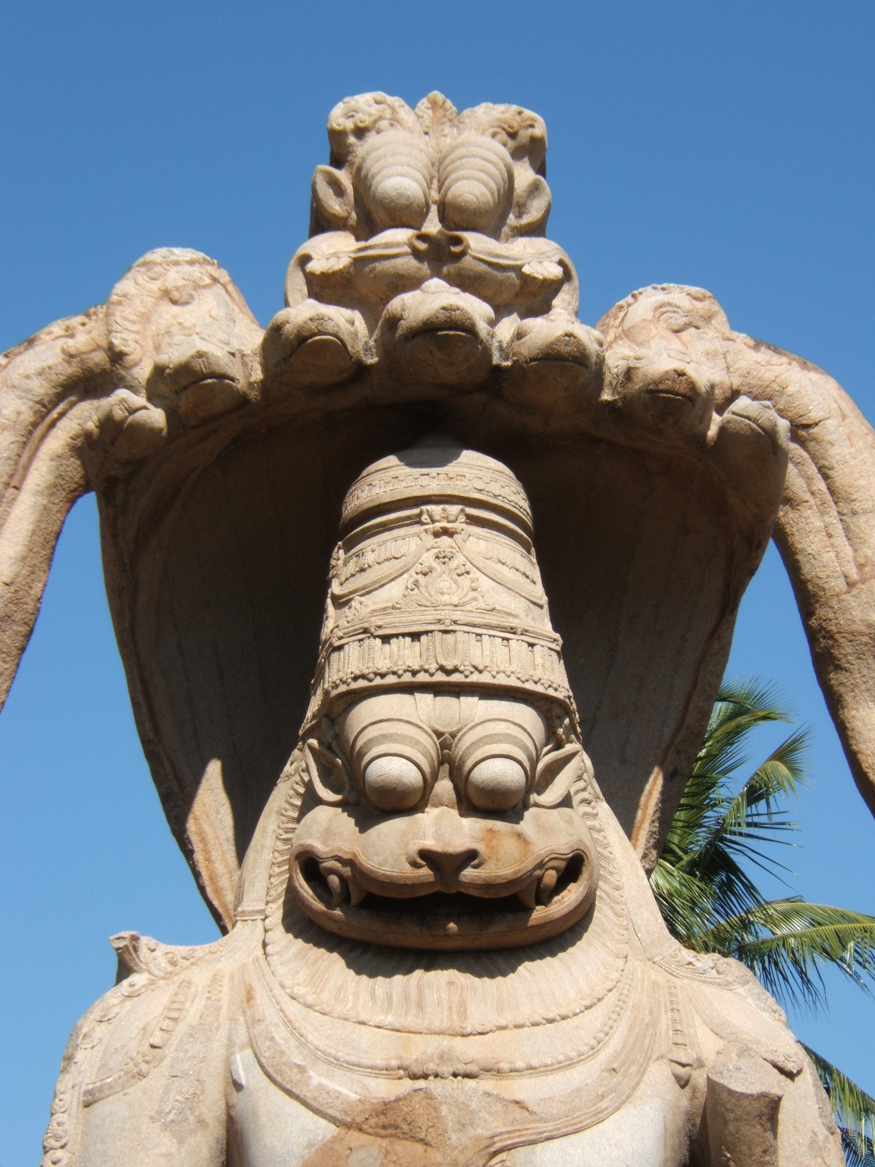 Hampi, Karnataka